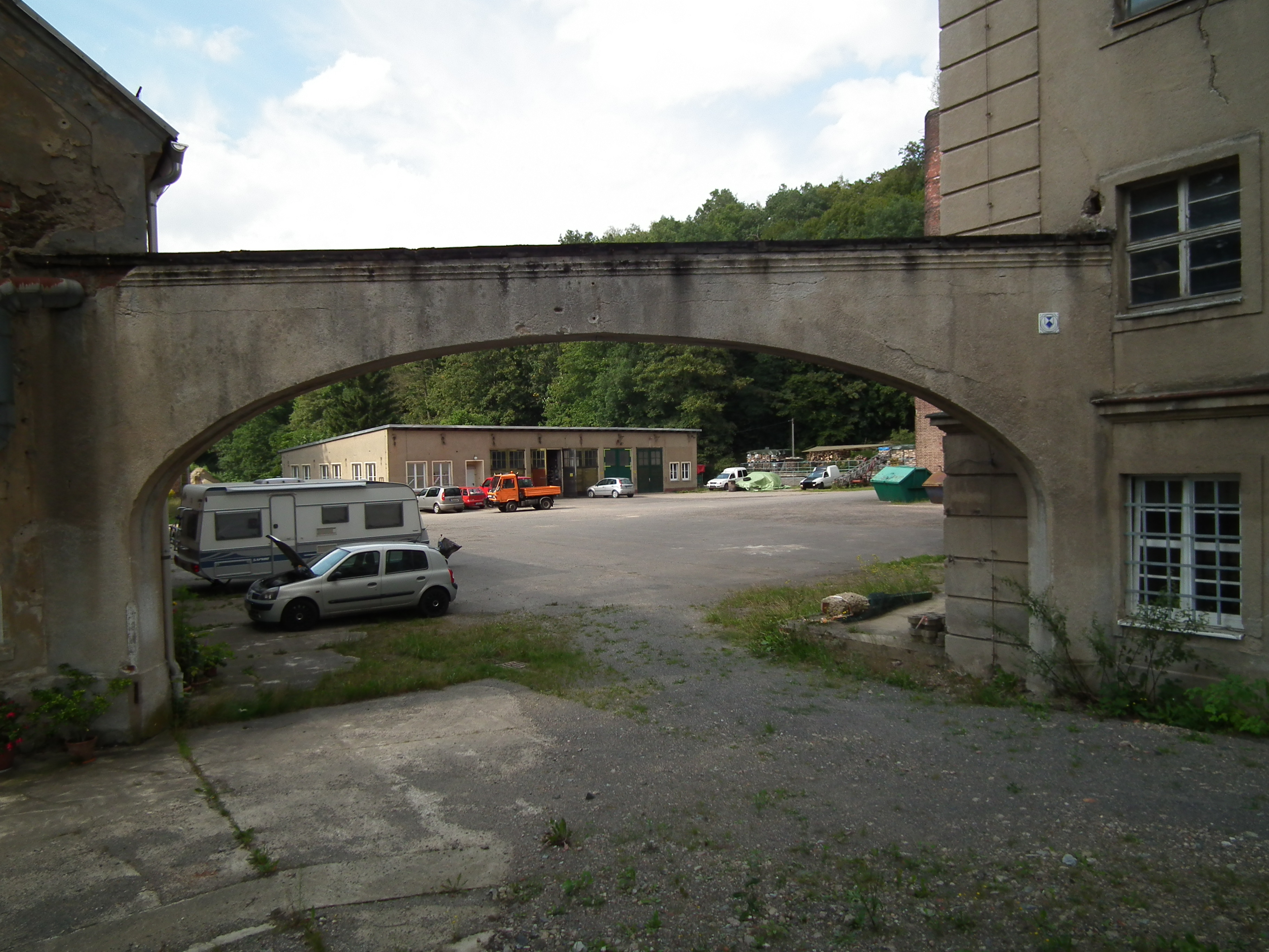 Sachsenburg